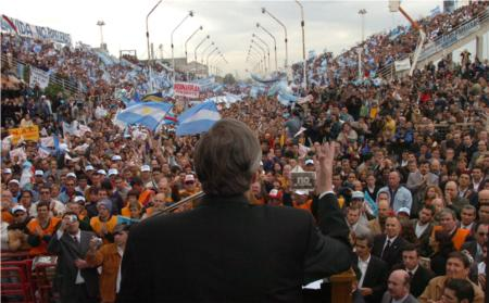 Manifestación en Gualeguachú (Argentina) en oposición a la instalación de las plantas de celulosa en Fray Bentos (Uruguay). Está presente el presidente argentino Néstor Kirchner.